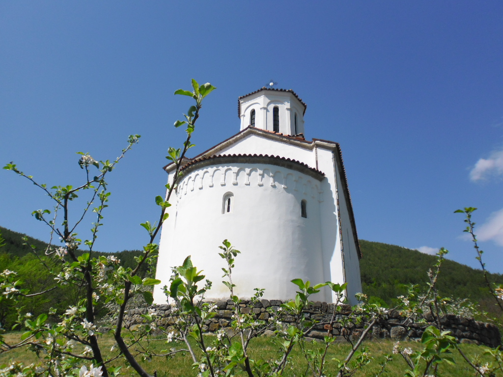 Манастир Кончул посвећен је светом Николи.